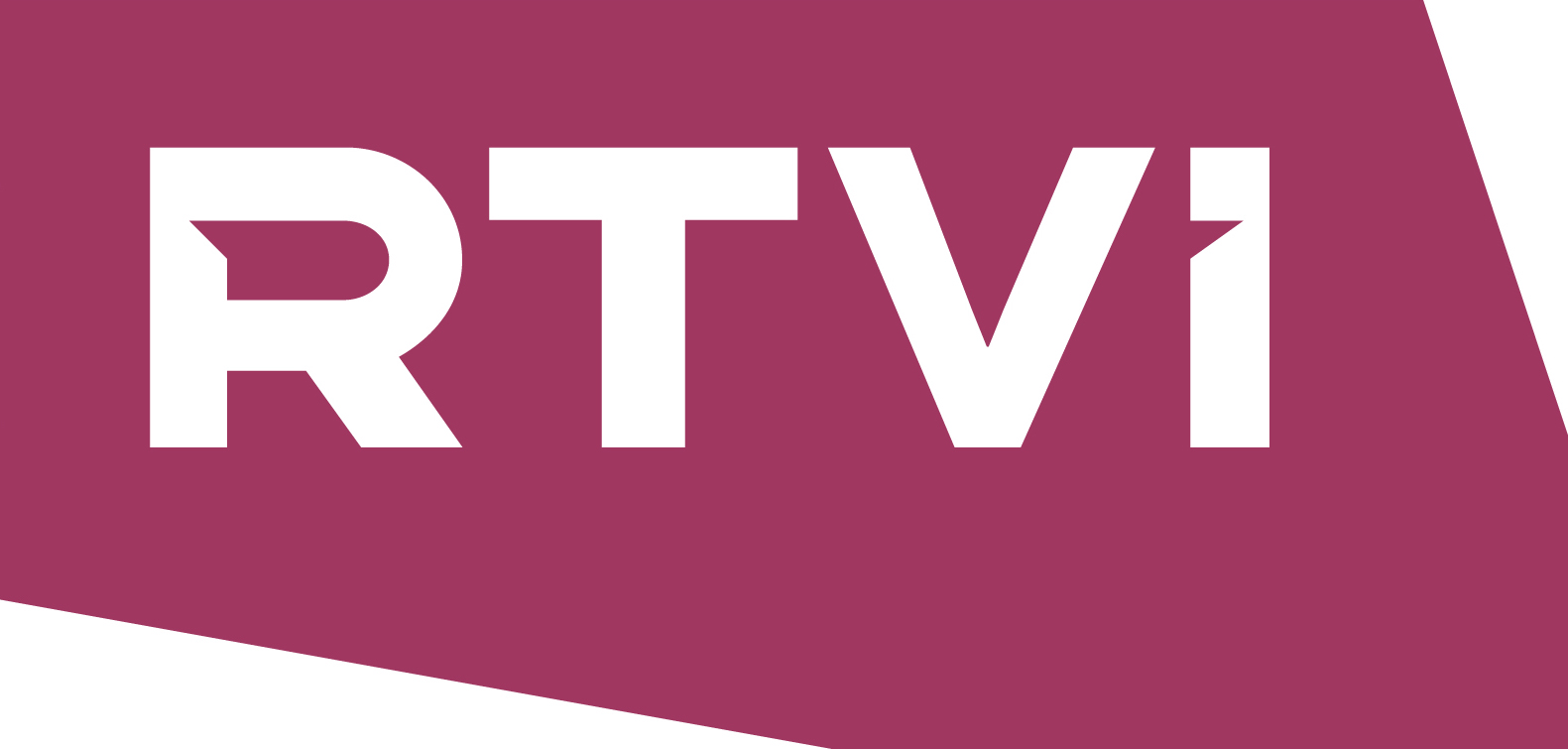 Logo RTVi 05.2017